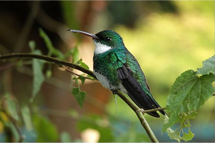 Leucochloris albicollis, from Monte Verde, Brazil.